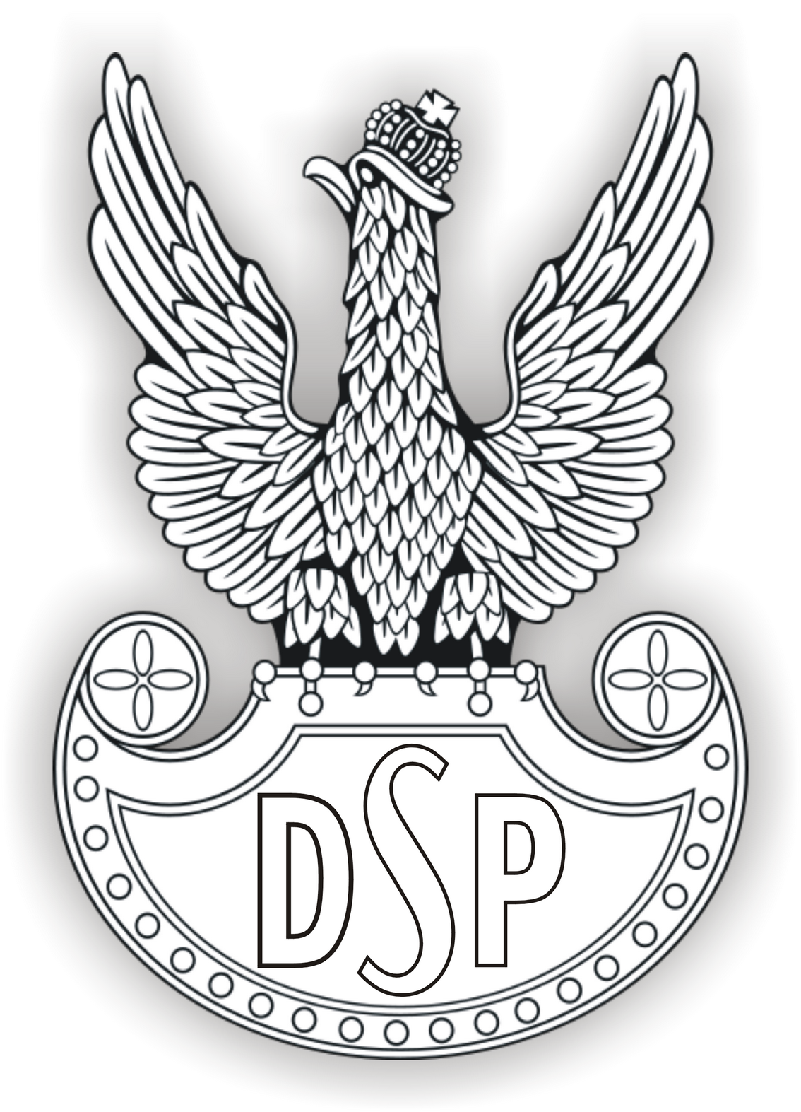 Orzełek 2 Dywizji Strzelców Pieszych Polskich Sił Zbrojnych na Zachodzie